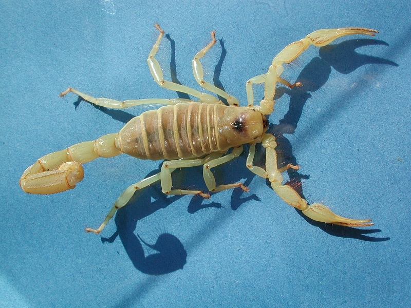 Skorpion aus Gefangenschaft, Hadrurus arizonensis, Haariger Wüstenskorpion, Desert Hairy Scorpion